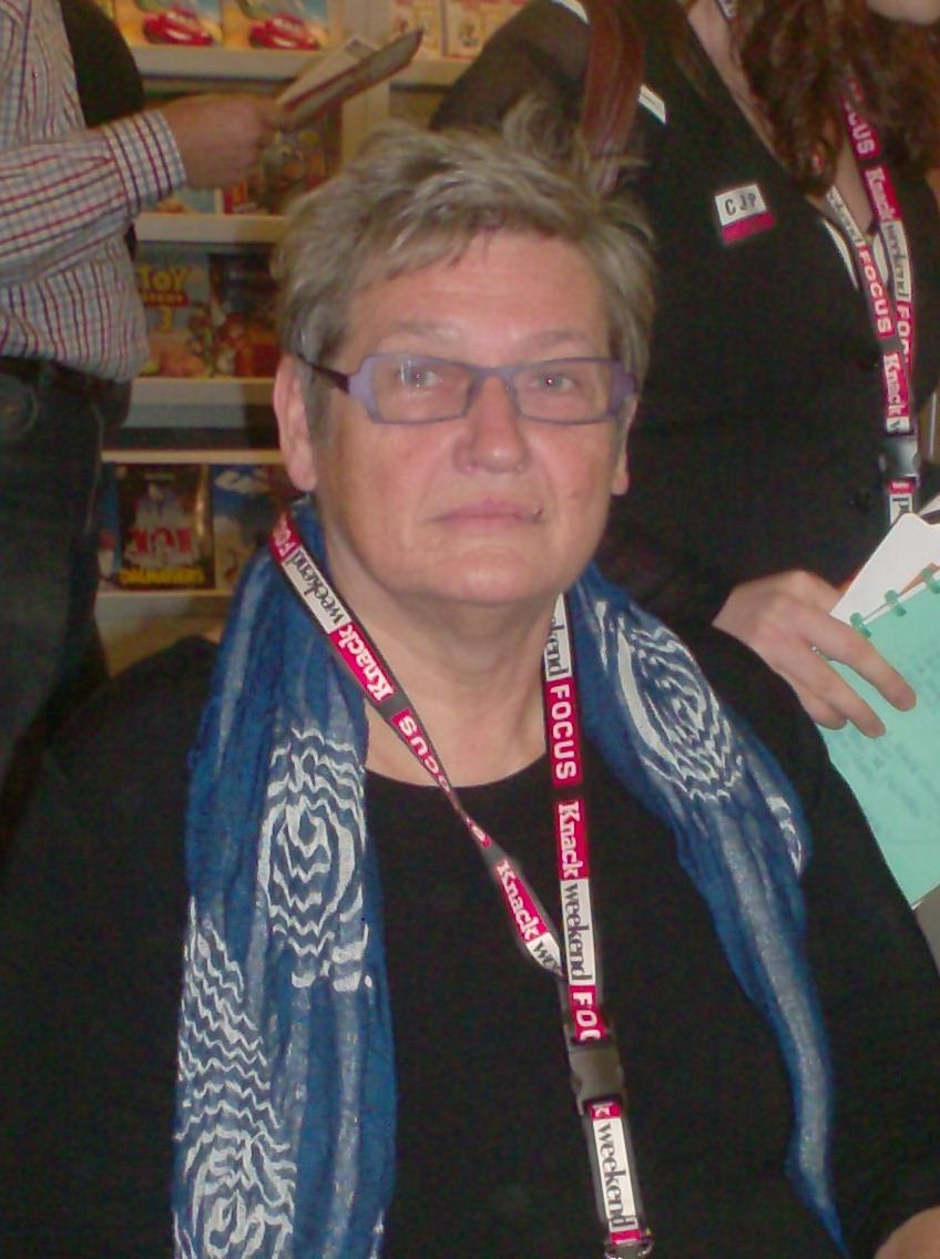 Foto van Leona Detiège op de Boekenbeurs 2010